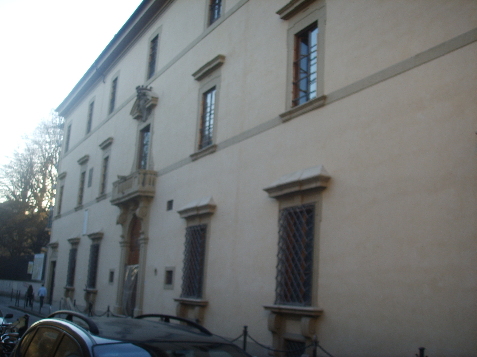 Palazzo_della_Gherardesca palace in Florence